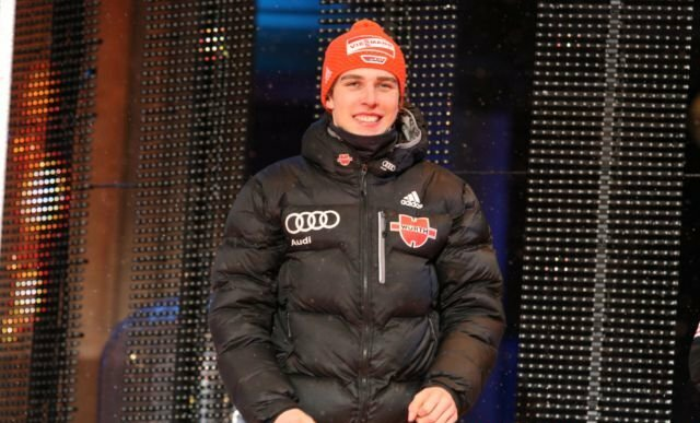 Johannes Rydzek podczas ceremonii medalowej po konkursie indywidualnym (Gundersen - skok na obiekcie HS106 + bieg na 10 kilometrów) w ramach Mistrzostw Świata w Narciarstwie Klasycznym 2011 w Oslo.